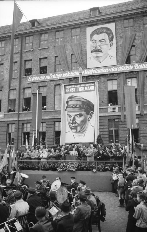 Illus-Biscan 2.5.1951 Magdeburger Krupp-Werk wurde "Ernst Thälmann-Werk". Am Vorabend des 1. Mai 1951 wurde auf Wunsch der 11500 Werktätigen des Krupp-Gruson-Werkes die Umbenennung vollzogen. UBz: Während der Feier. Rosa Thälmann hat soeben das große Thälmann-Porträt enthüllt.